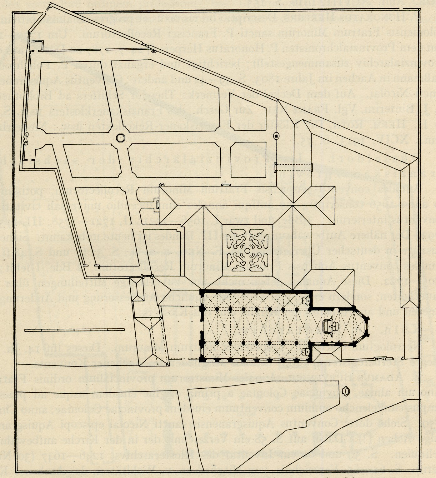 St. Nikolauskirche mit dem Grundriss des Franziskanerkosters 1732, Aachen.